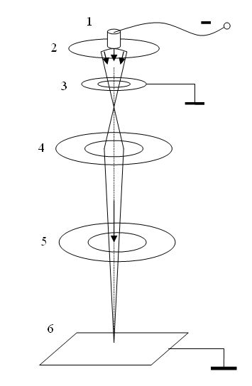 Электронная пушка